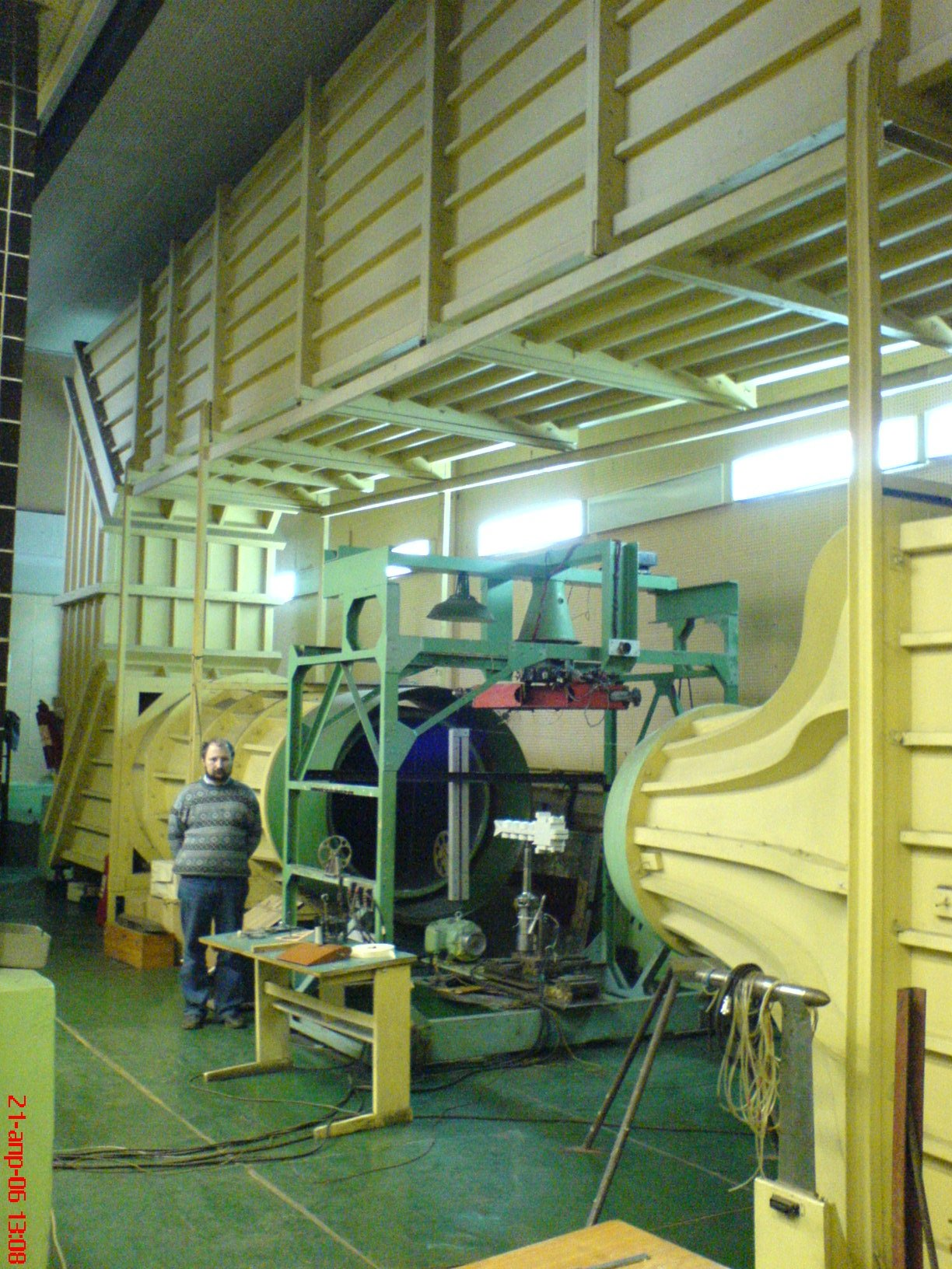 Аэродинамическая труба СПГУВК